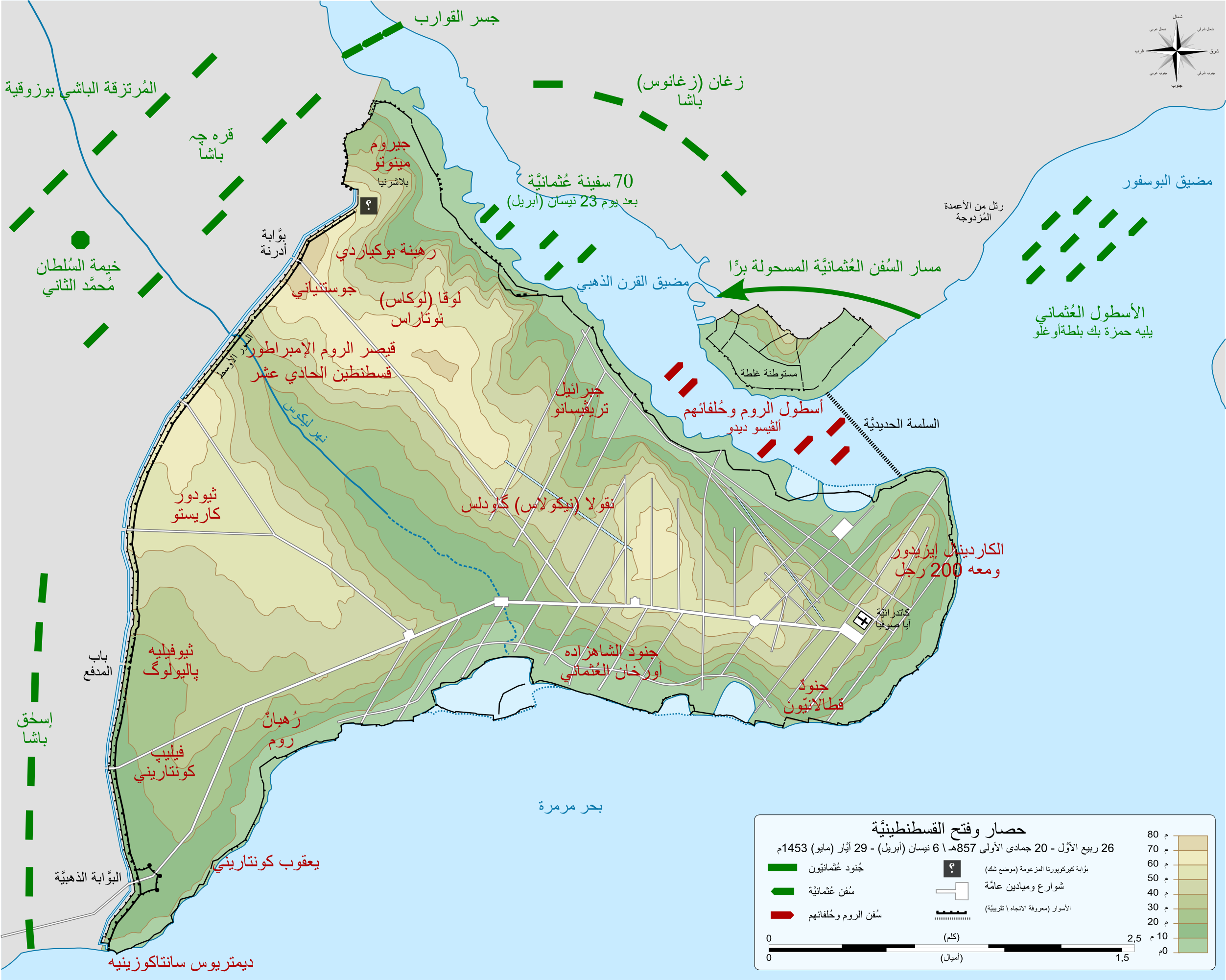 خارطةٌ تُظهرُ توزّع القوَّات البيزنطيَّة والعُثمانيَّة خلال حصار القسطنطينيَّة، الذي دام من يوم 6 نيسان (أبريل) سنة 1453 حتَّى 29 أيَّار (مايو) 1453.